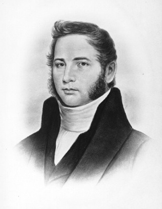 Portrait de Philippe Aubert de Gaspé.